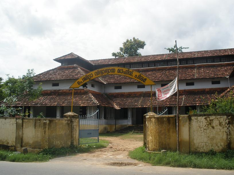 ഉപജില്ലാ വിദ്യാഭ്യാസ ഓഫീസ്, ചിറ്റൂർ.